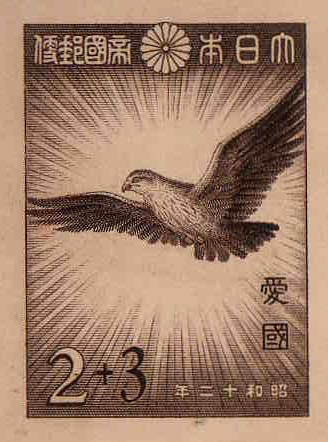 愛国募金のための官製はがきの料金部分の拡大図、描かれているのは金鵄である。